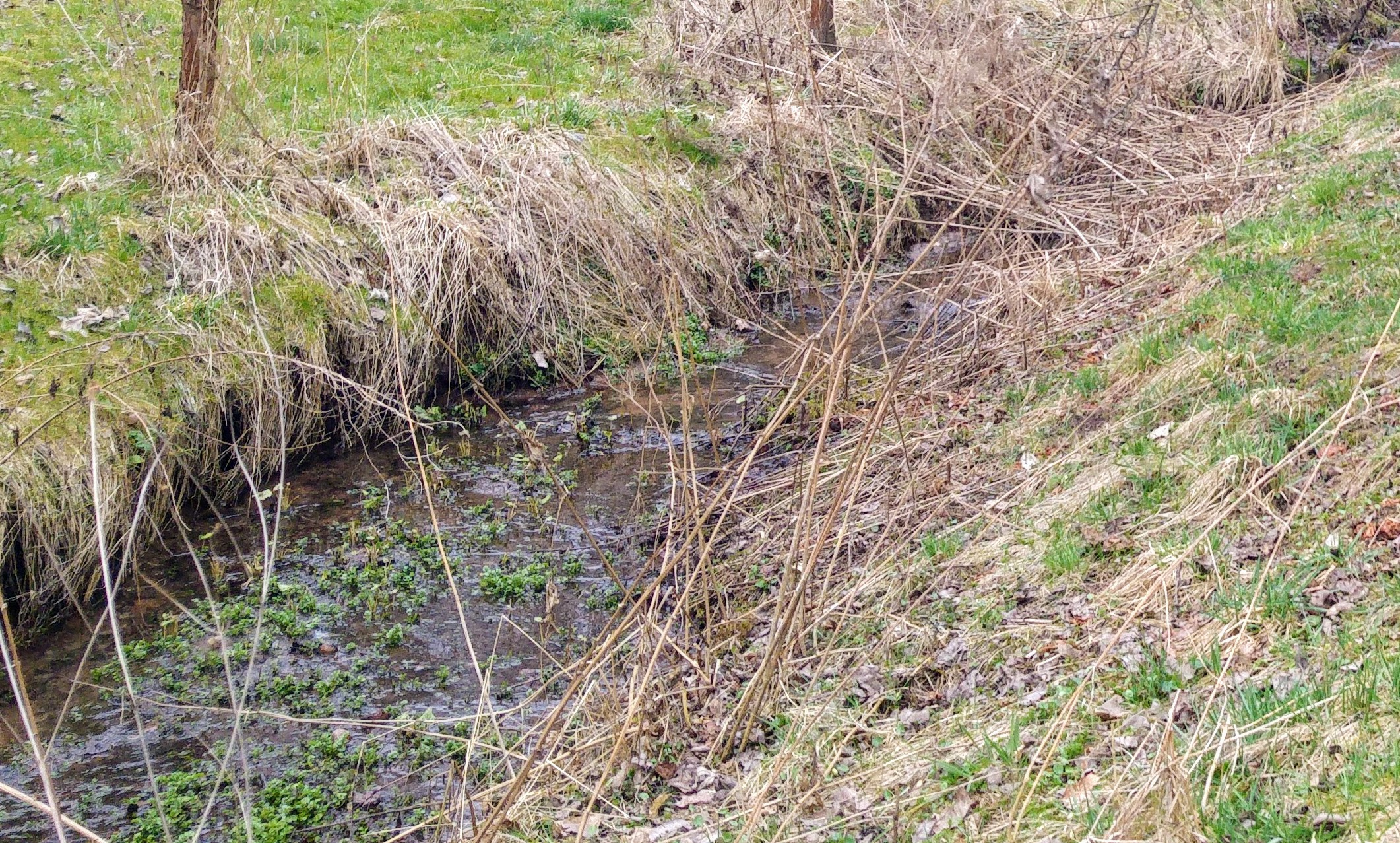 Stříbrný potok